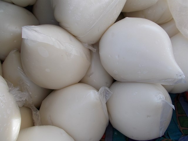 boule blanche légèrement fermentée à base du maïs This is an image of food from Togo